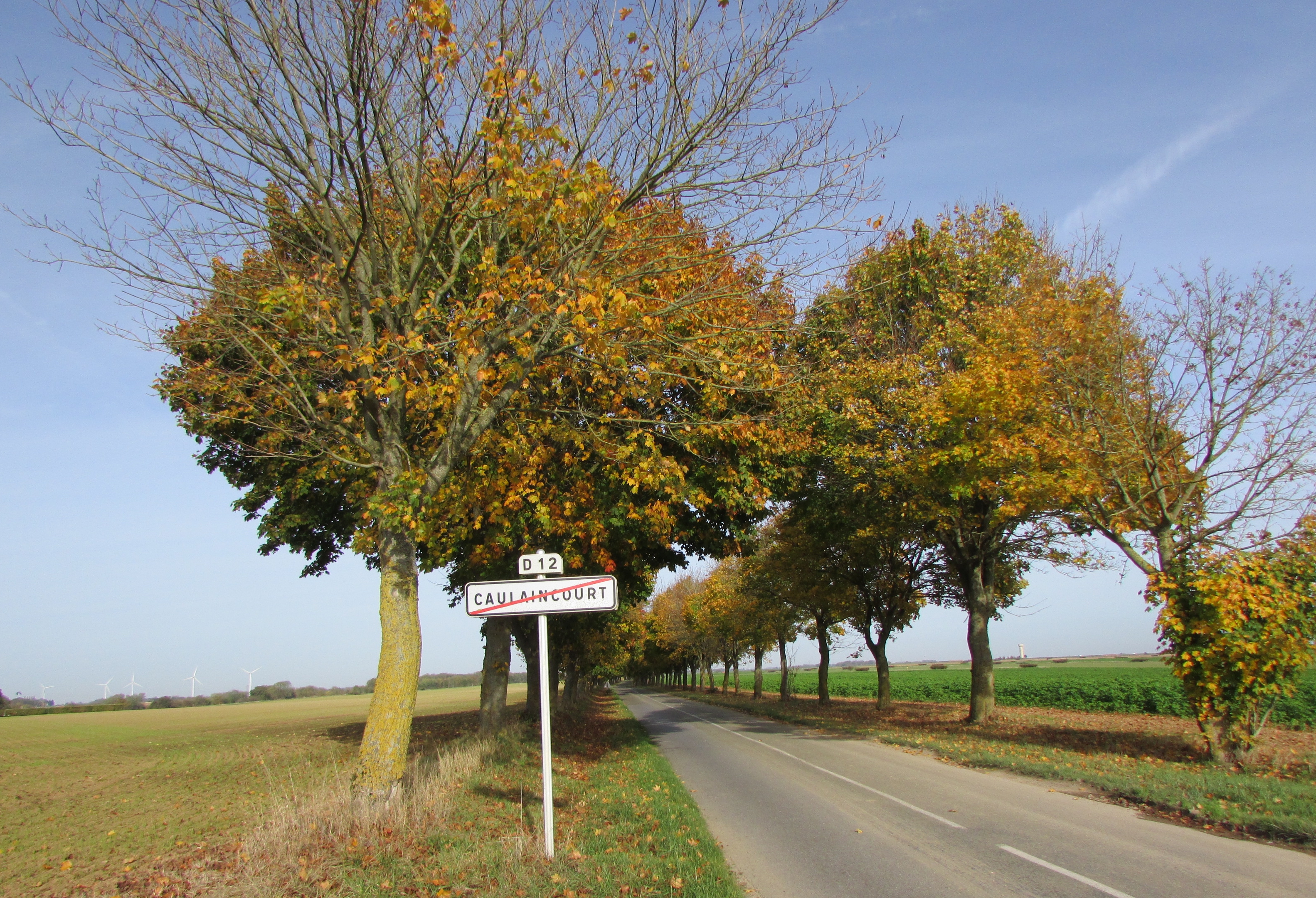 Route bordée d'arbres vers la D1029